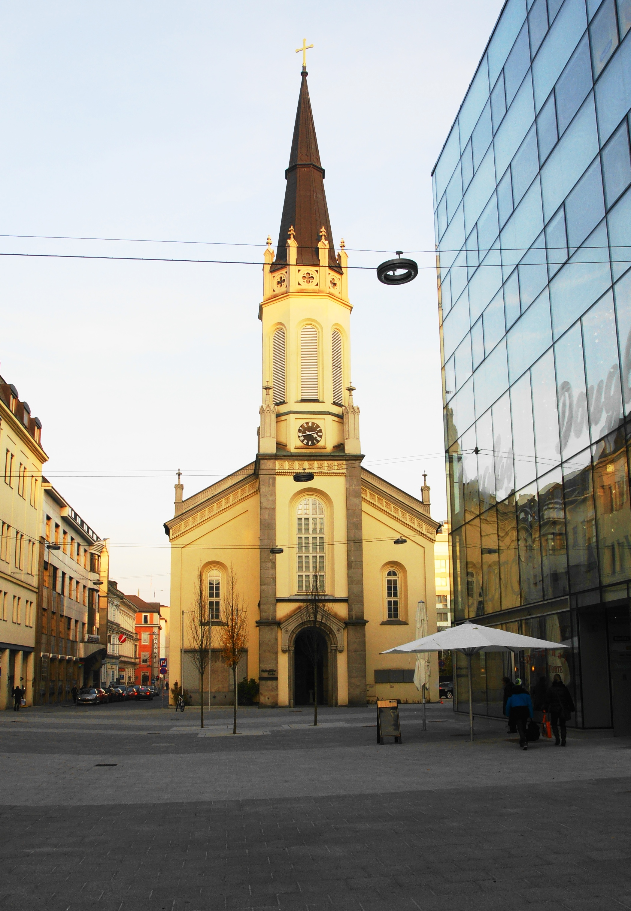 Martin-Luther-Kirche in Linz von der Landstraße aus aufgenommen. Neue Vorplatzgestaltung seit Oktober 2011.